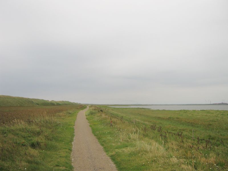 Vestkystruten auf der Harbøere Tange, Fahrtrichtung Norden nach Thyborøn. Ganz am Horizont kann man schwach die Schornsteine der Fischmehrfabruk von Thyborøn sehen.